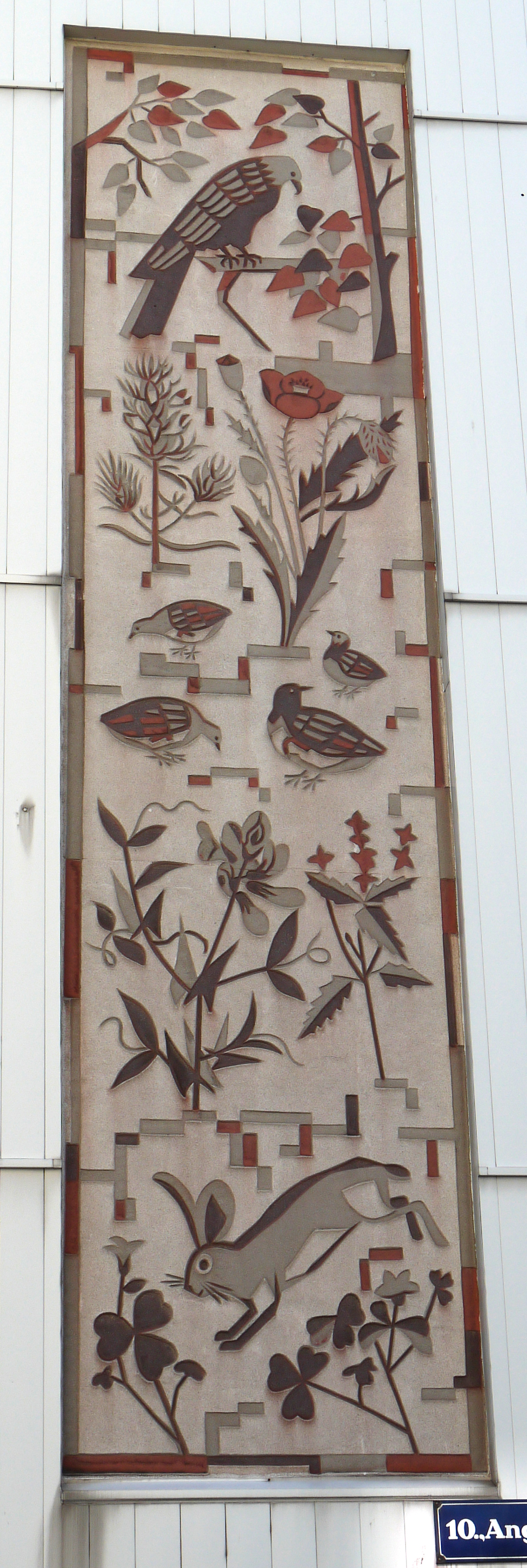 Sgraffito Tiere und Pflanzen des Wienerbergs